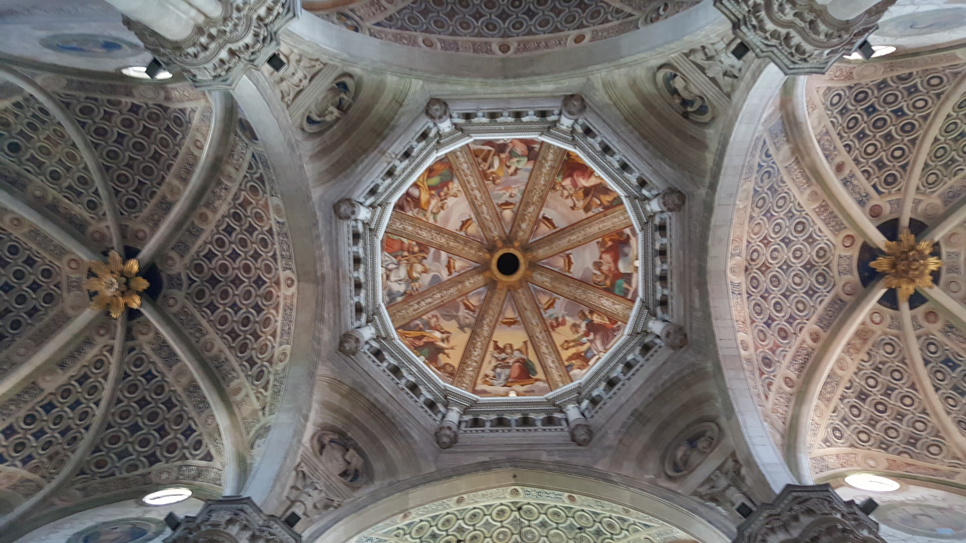 Interno della cupola e visione delle volte